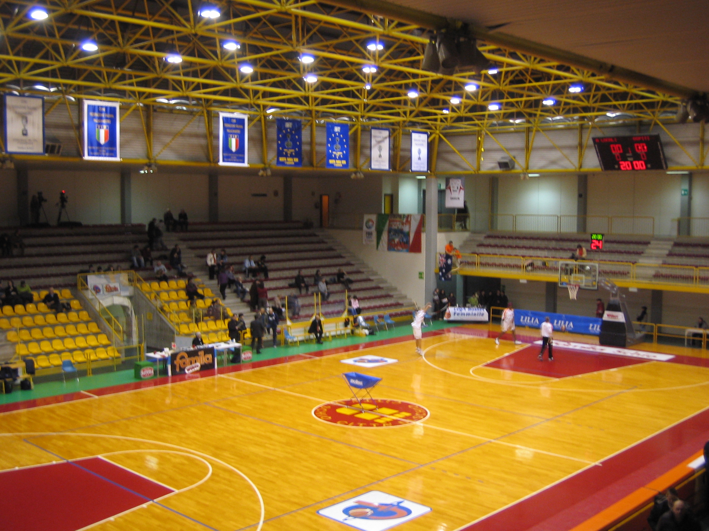 Pala Campagnola Schio